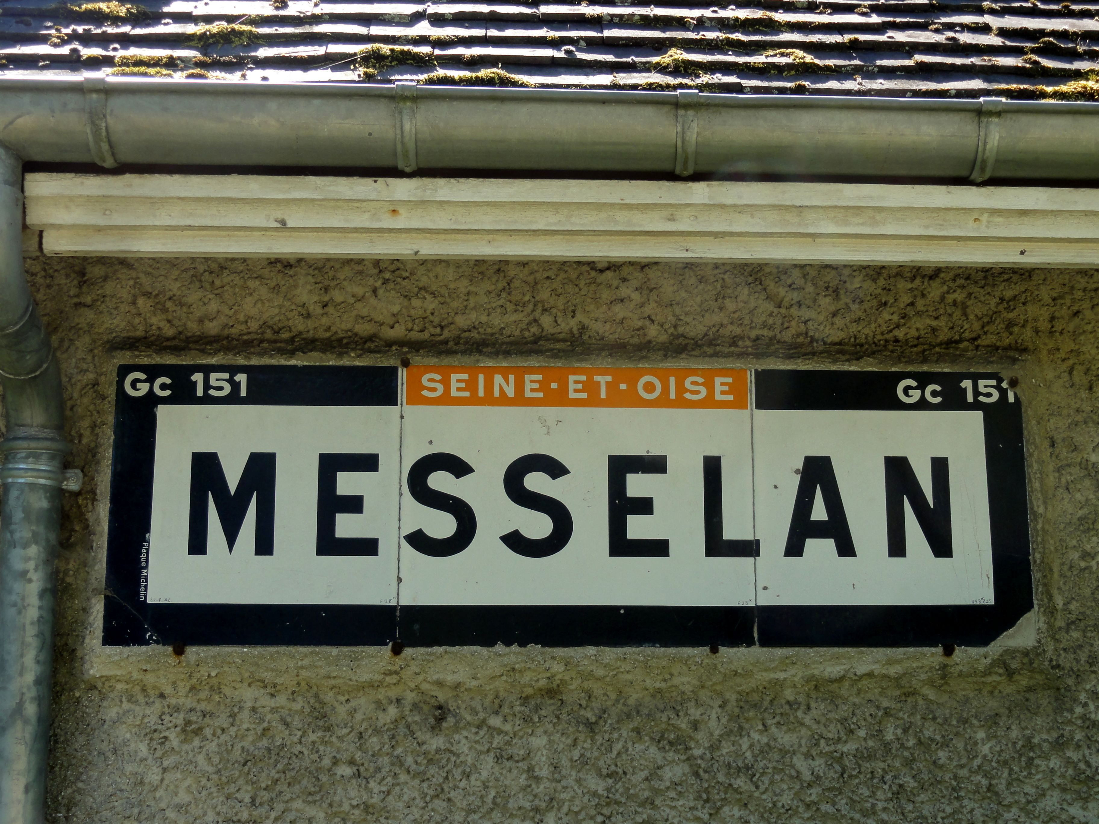 Plaque Michelin de 1932, au hameau de Messelan.